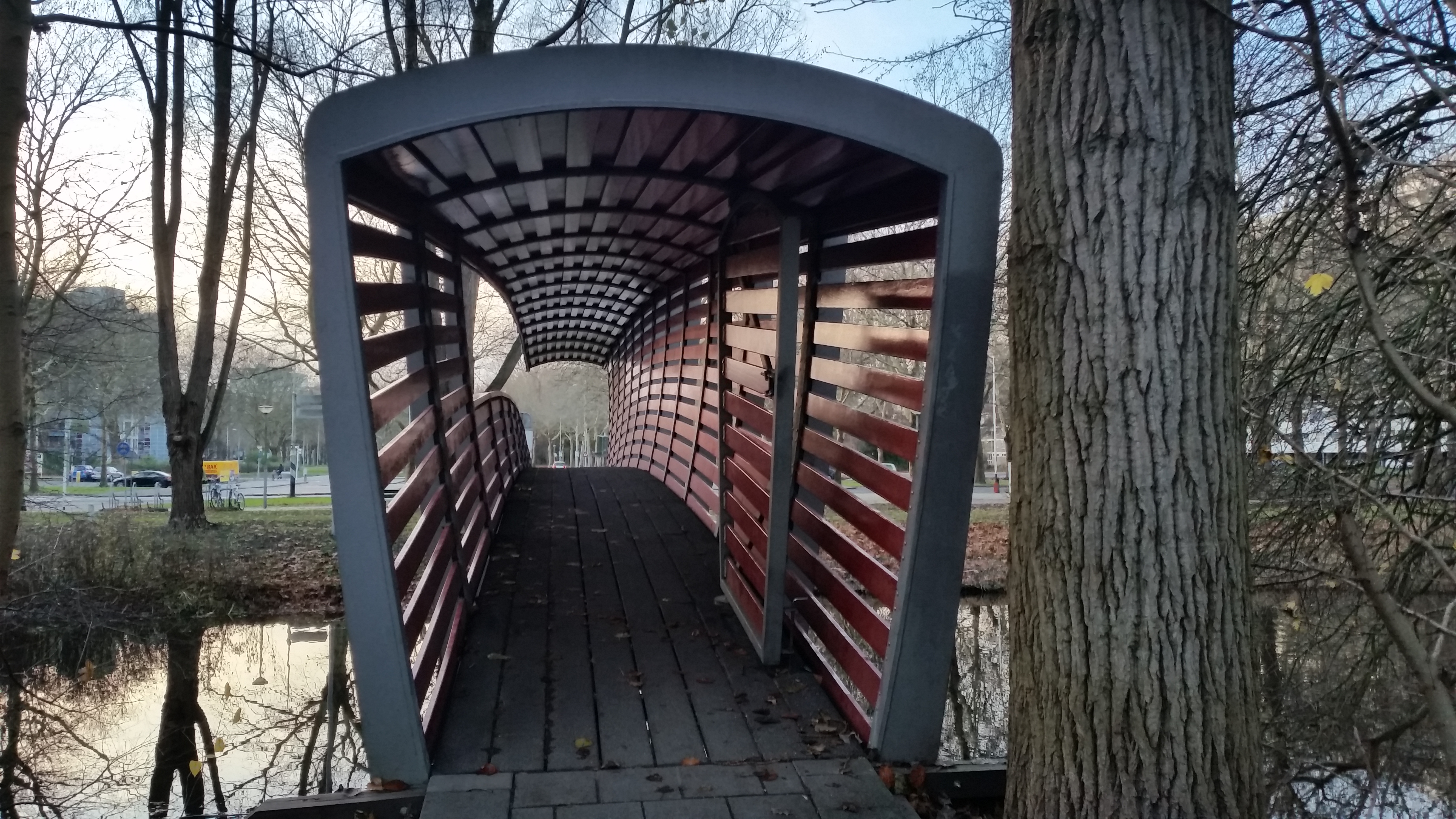 Tunnel van Brug 836, Rode brug